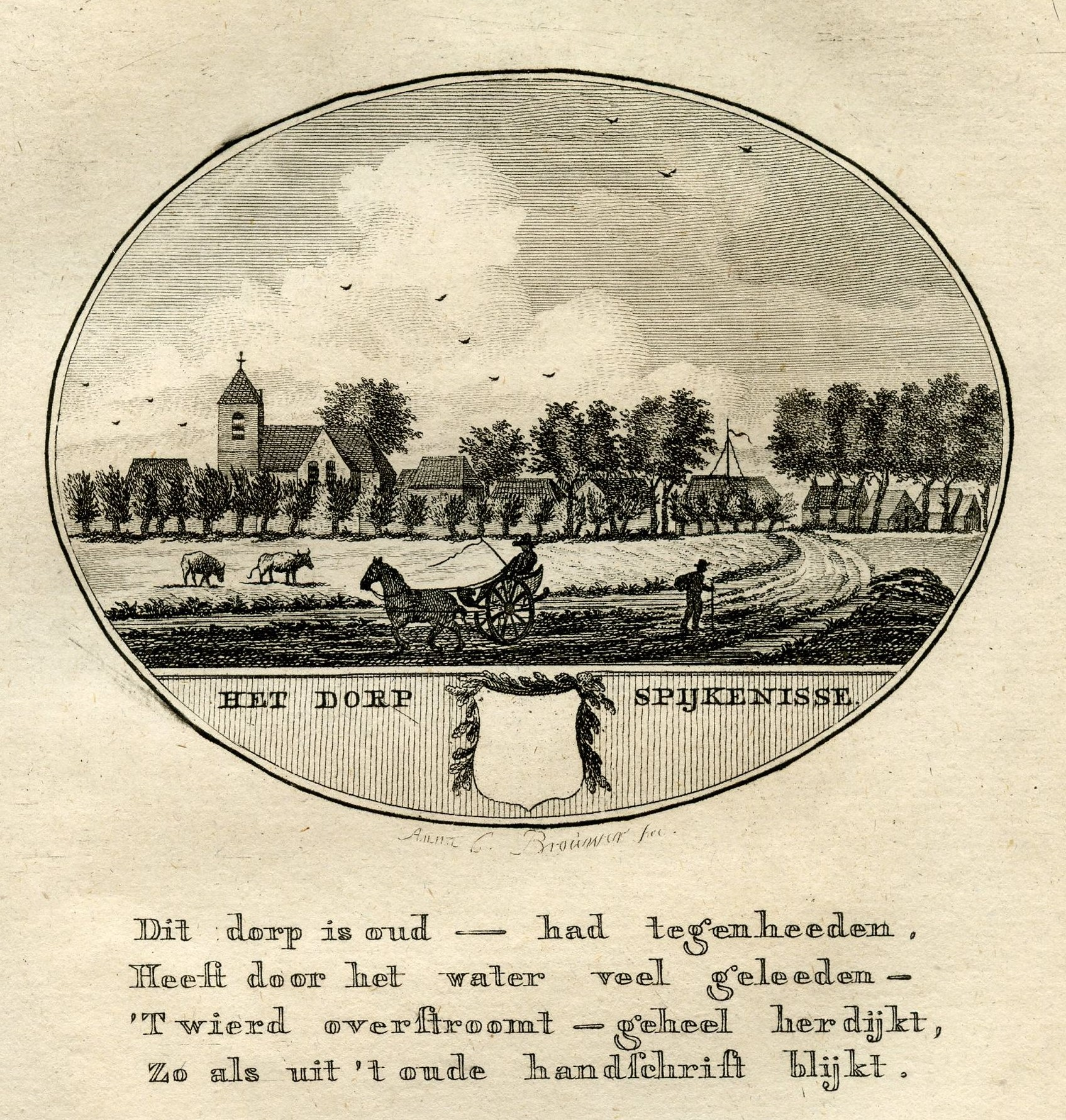 Gravure van het dorp Spijkenisse van Anna Catharina Brouwer, met een 4-regelig vers. Verschenen inː De Nederlandsche stad- en dorp-beschrijver / Lieve van Ollefen (tekst), Anna Catharina Brouwer (gravures), Deel VI: Het land van Voorne en Putten, Overflaque, Portugal, etc., 1798. De tekst luidtː Het dorp is oud - had tegenheeden. Heeft door het water veel geleden - 'T wierd overstoomt - geheel herdijkt, zo als uit 't oude handschrift blijkt.